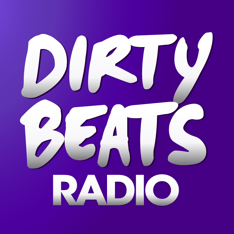 Dirty Beats Radio